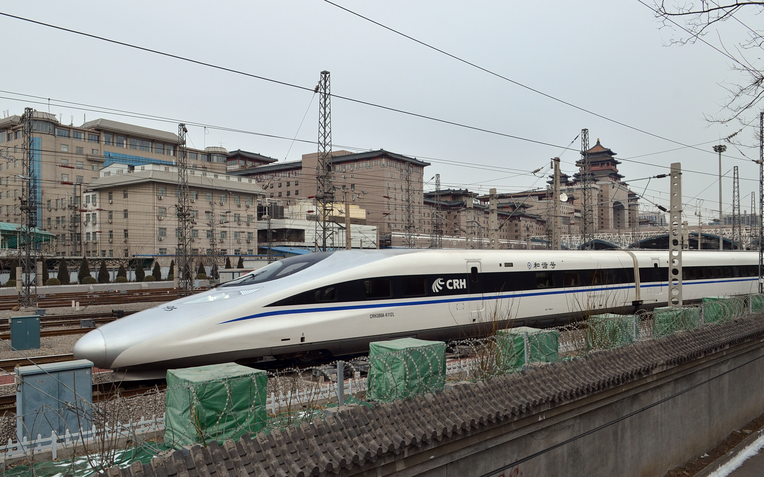 中文（中国大陆）: CRH380AL型 (编号6112) 动车组正驶离北京西客站